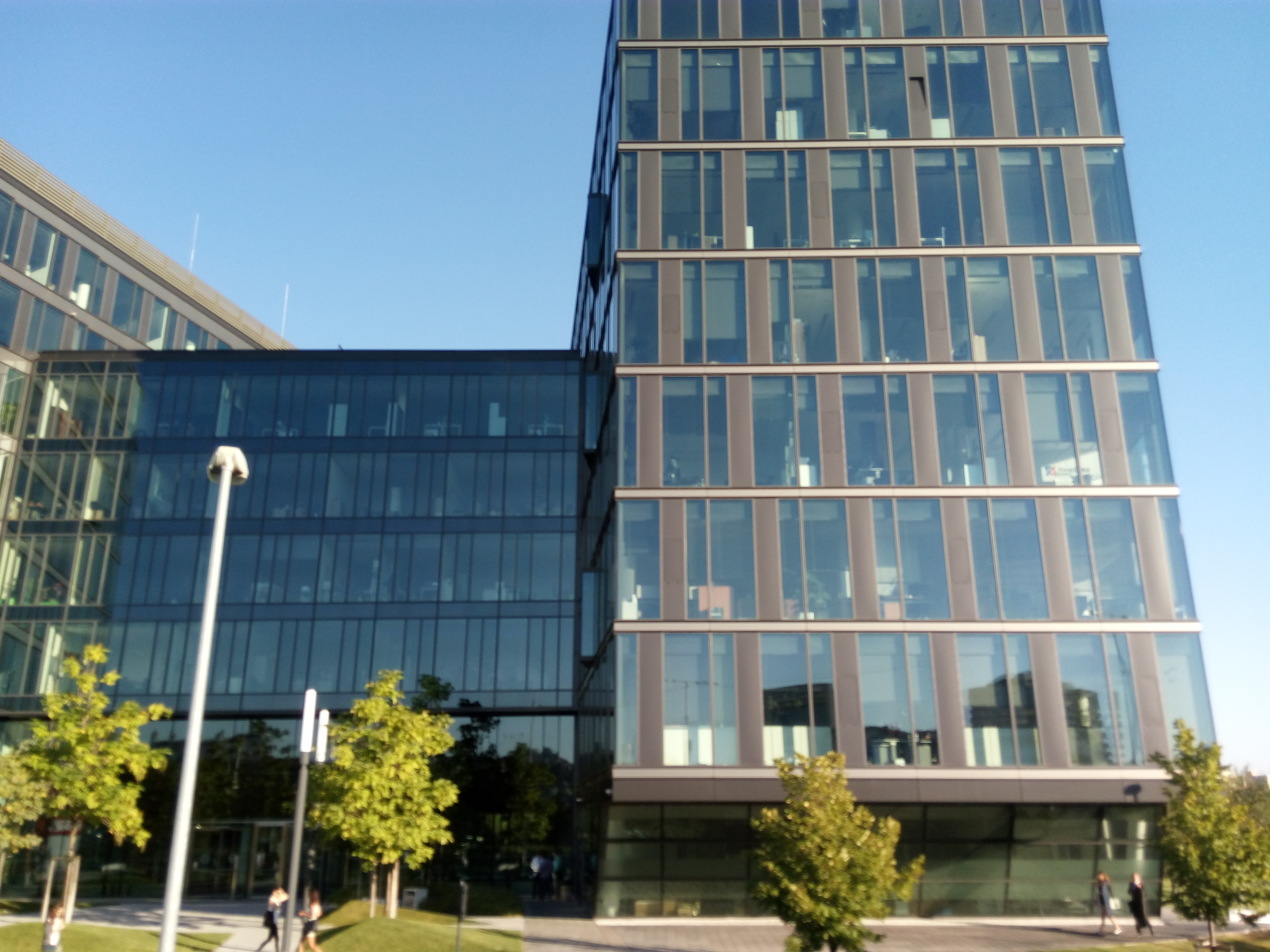 Digital Park, Einsteinova, Petržalka, Bratislava